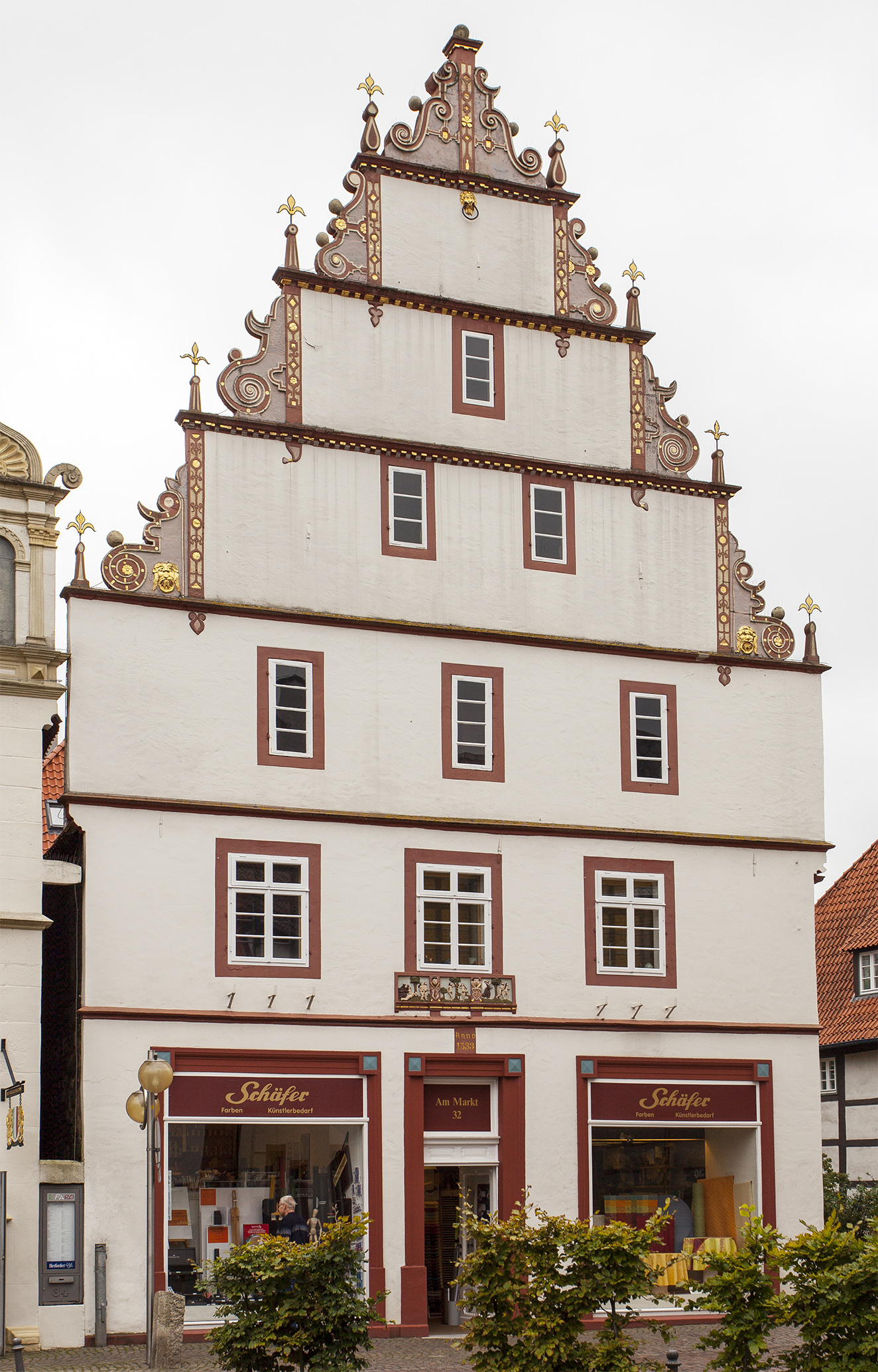 Bad Salzuflen, Am Markt 32This is a photograph of an architectural monument., no. 5